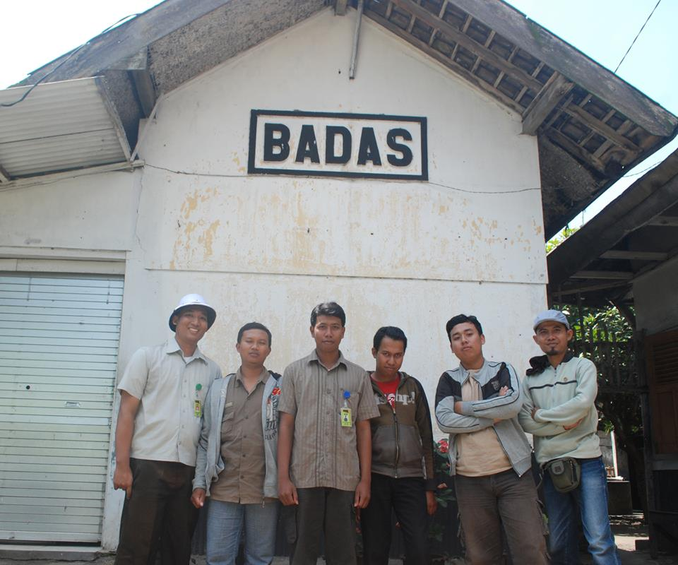 Eks Stasiun Badas (Dengan rekan-rekan blusukan)